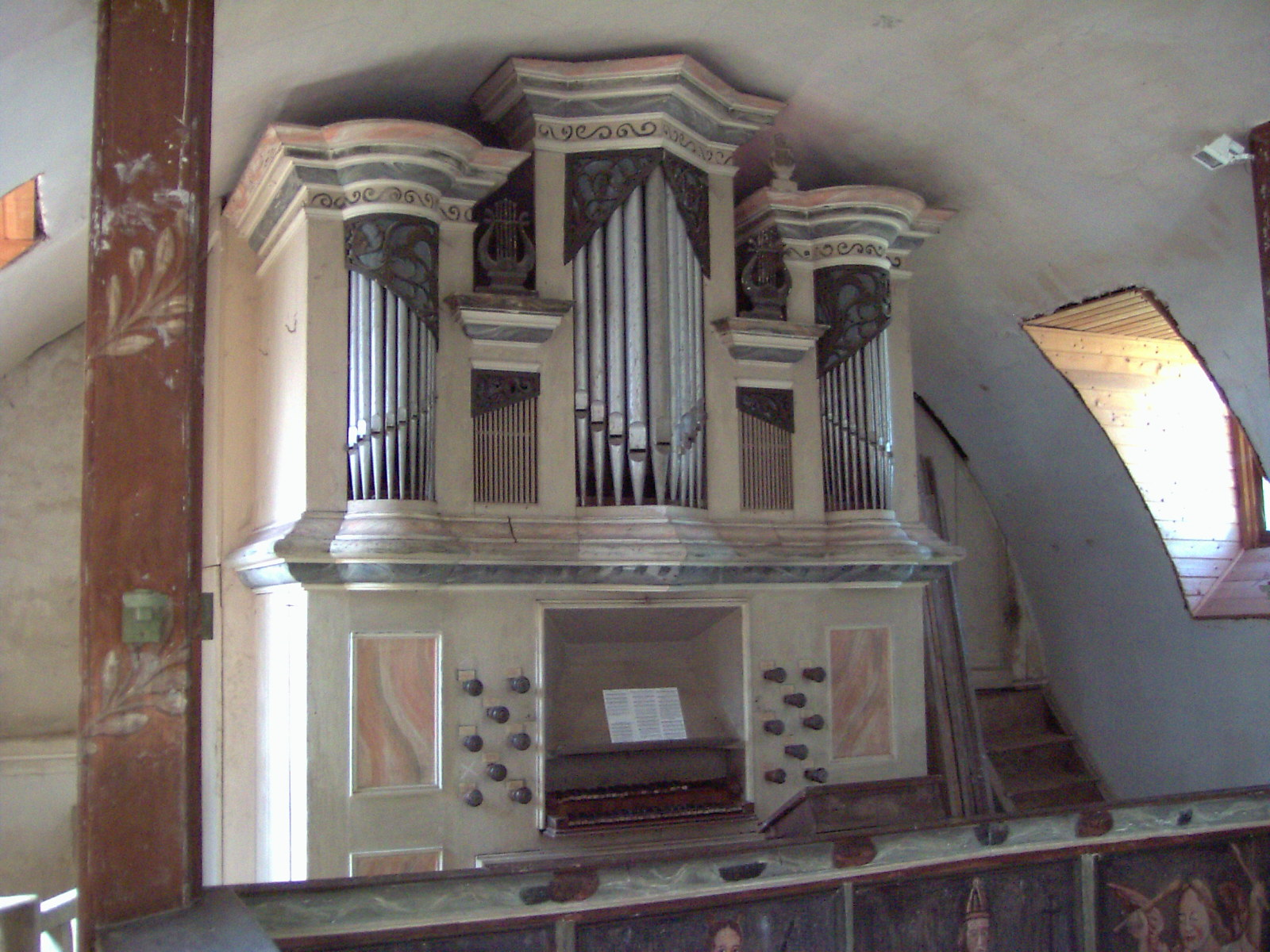 Sohnstedt